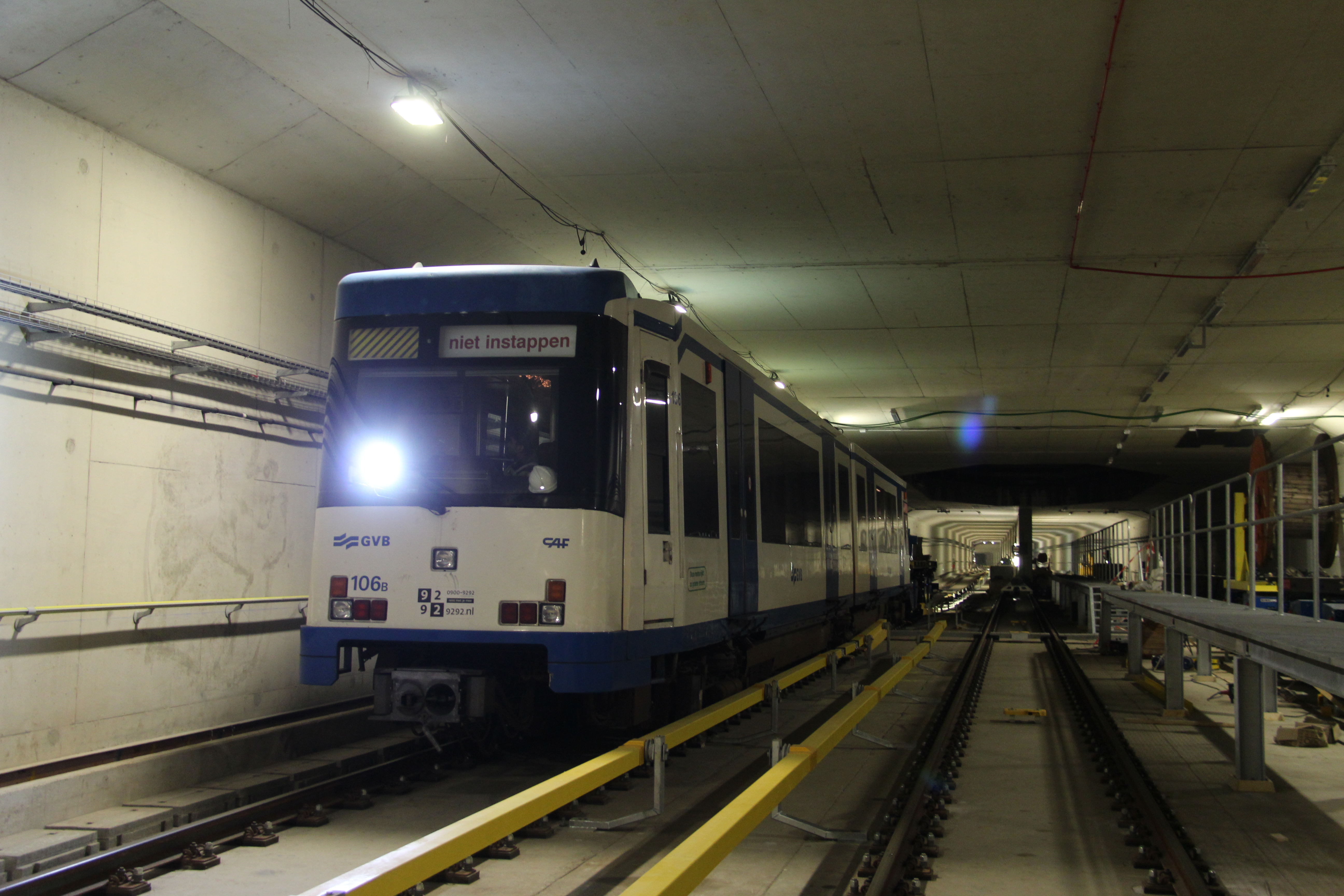 Metrostel GVB 106 op het wisselcomplex te Sixhaven van de Noord/Zuidlijn.